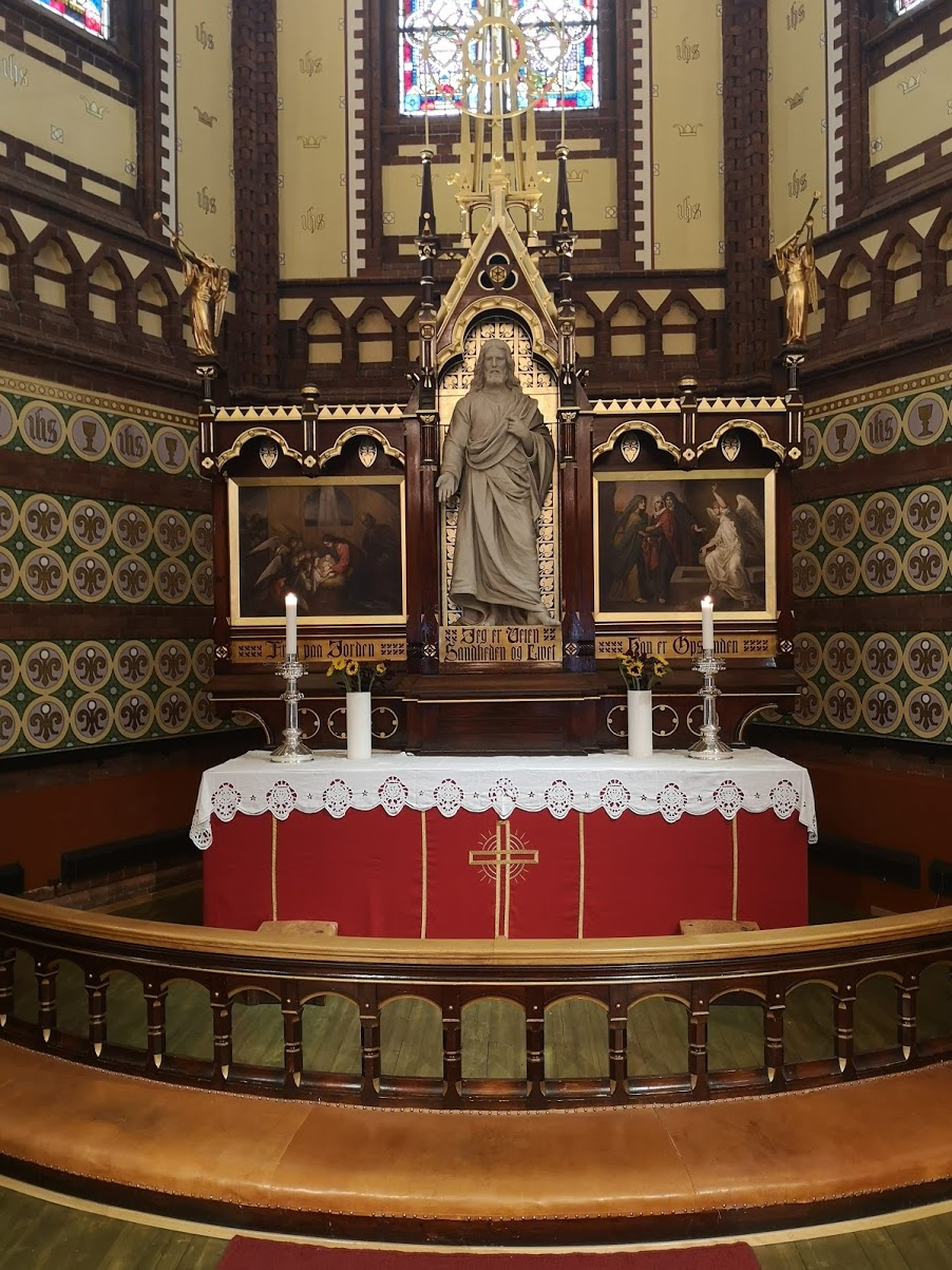 Alteret i Paulus kirke i Oslo